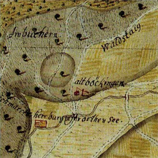 Kupferstich von Altböckingen (Heilbronn, Arndtstraße)